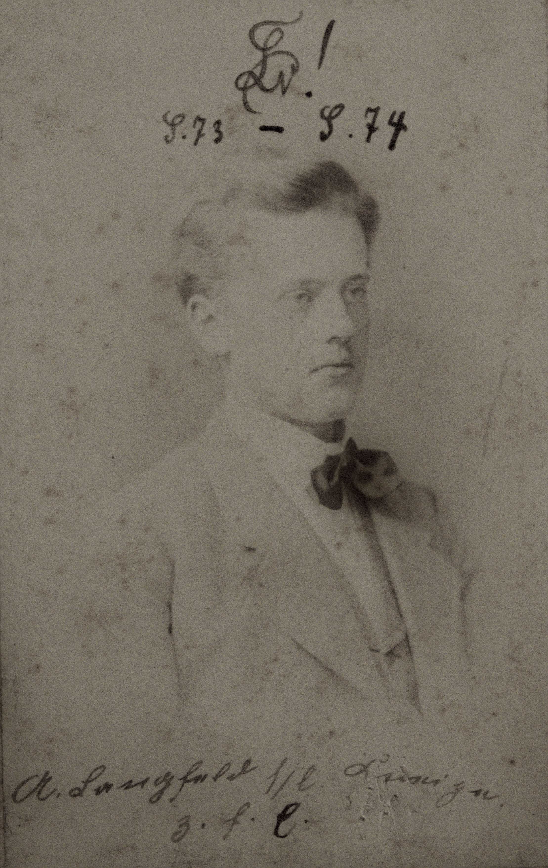 Fotografie von Adolf Langfeld als Mitglied der Studentenverbindung Leonensia in Heidelberg. Standort: Ahnengalerie im Conventssaal der Verbindung Leonensia. Bildbeschreibung: Oben Steht "Verbindungszirkel! / S[ommer]. 73 - S.[emester]. 74". Unten steht "A[dolf]. Langfeld s[einer]/l[ieben] Leonensia / z[u]. f[reudigen]. E[reignis]".